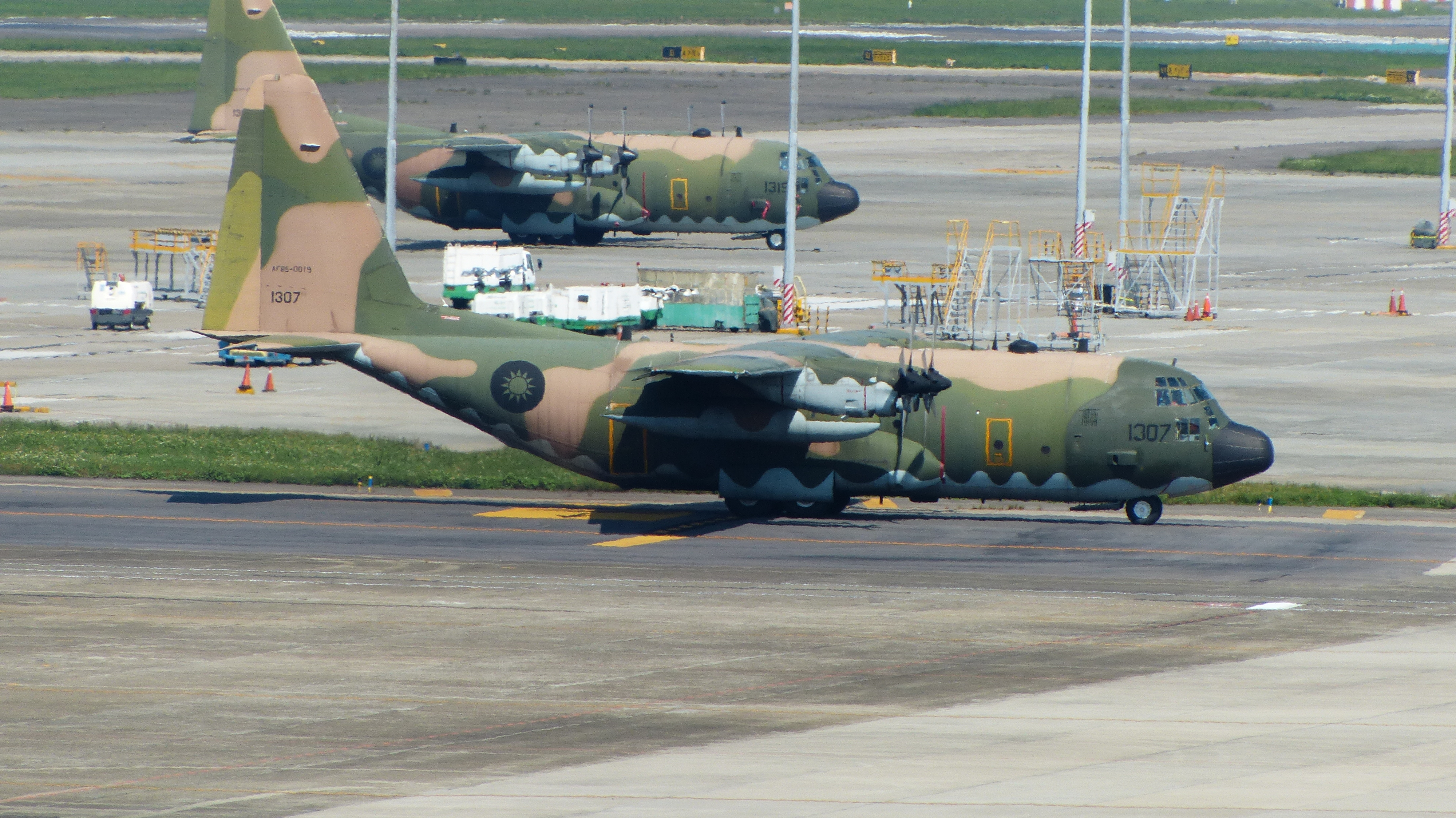 空軍松山基地停機坪移動中，即將起飛的439混合聯隊第10空運大隊C-130H 1307，後方是C-130H 1319。